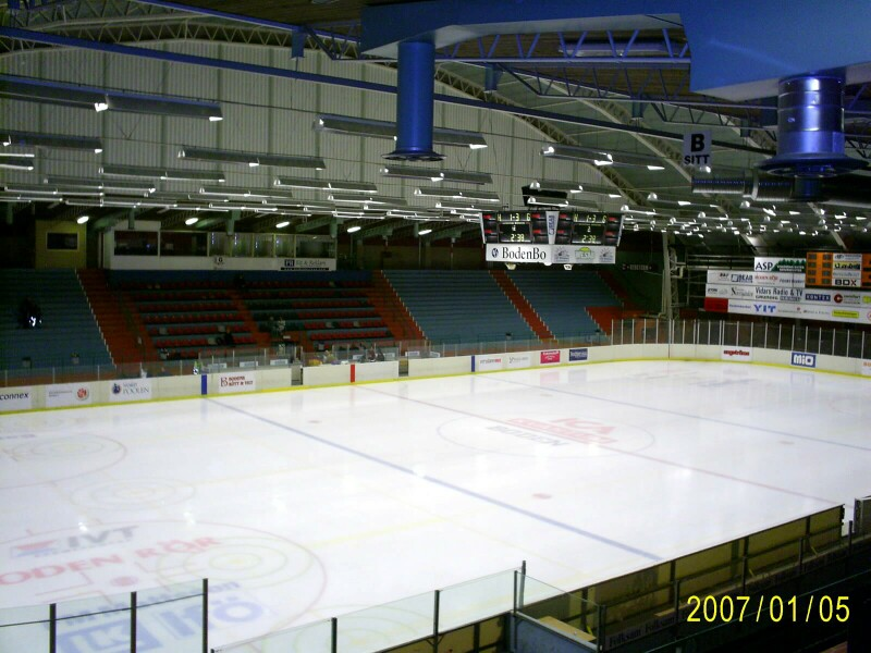 Björknäshallen, interior